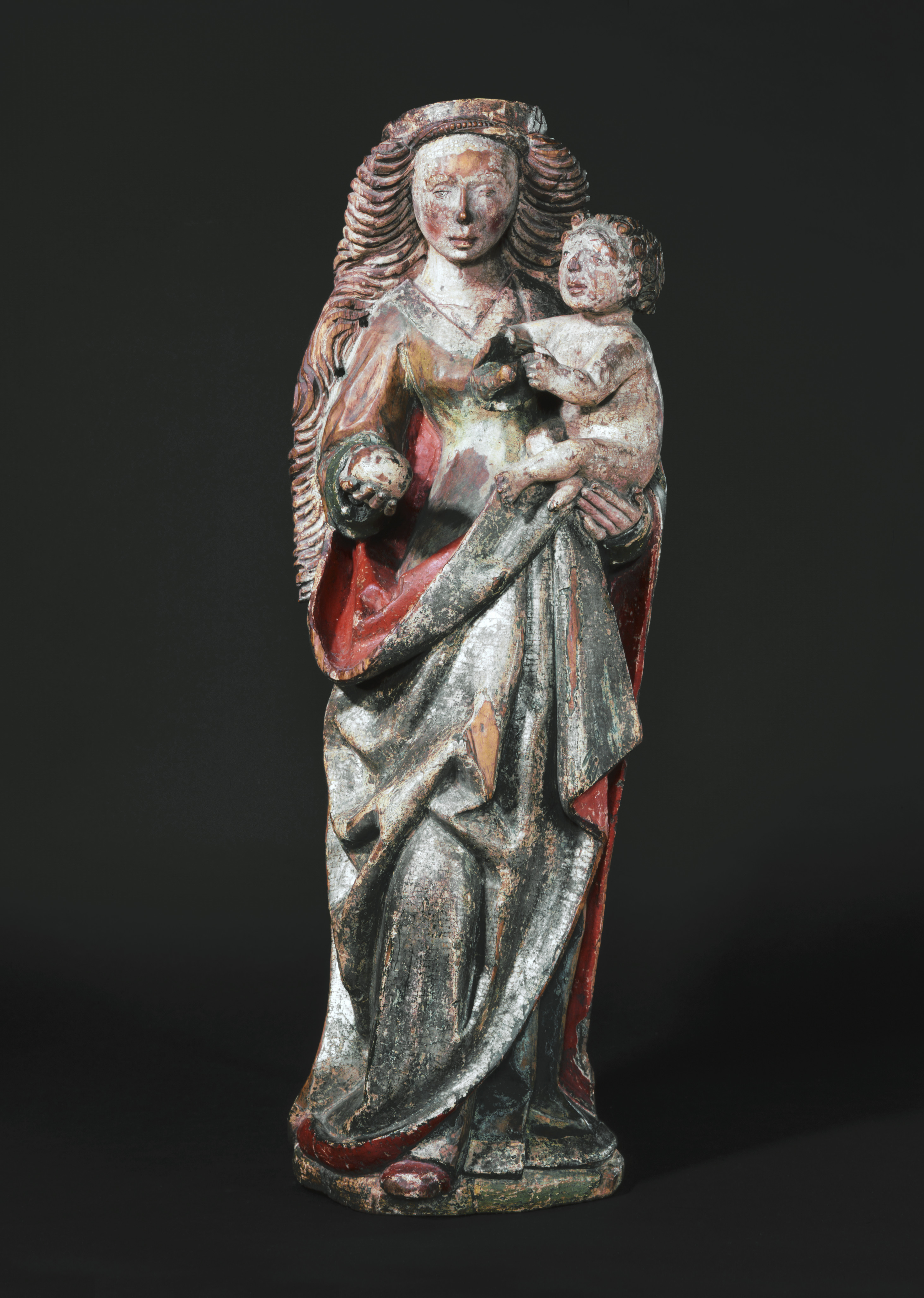 Madonna med barn fra Lisleherad, opprinnelig brukt i Lisleherad stavkirke. Foto: Åse Kari Hammer, fra Kulturhistorisk museums fotosamling på Unimus (jf. søk).